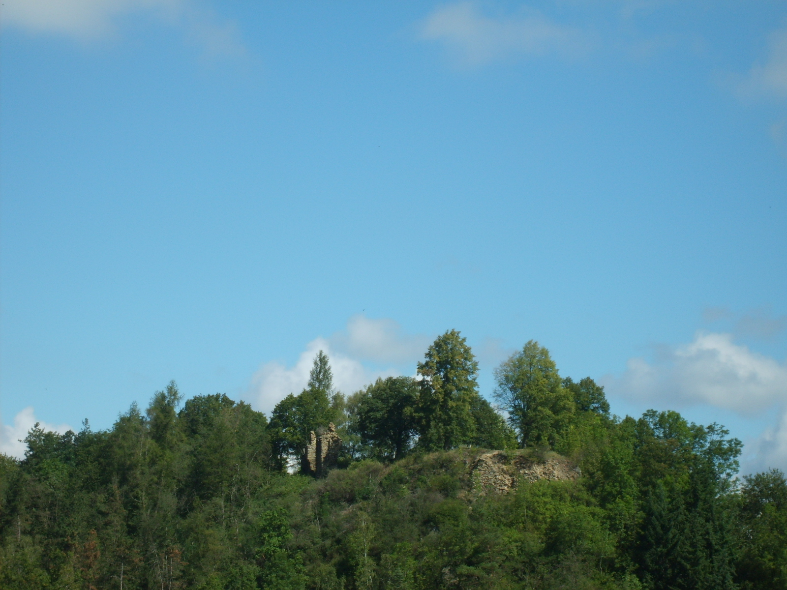 Ruin of Bělá Castle above Dolní Bělá.